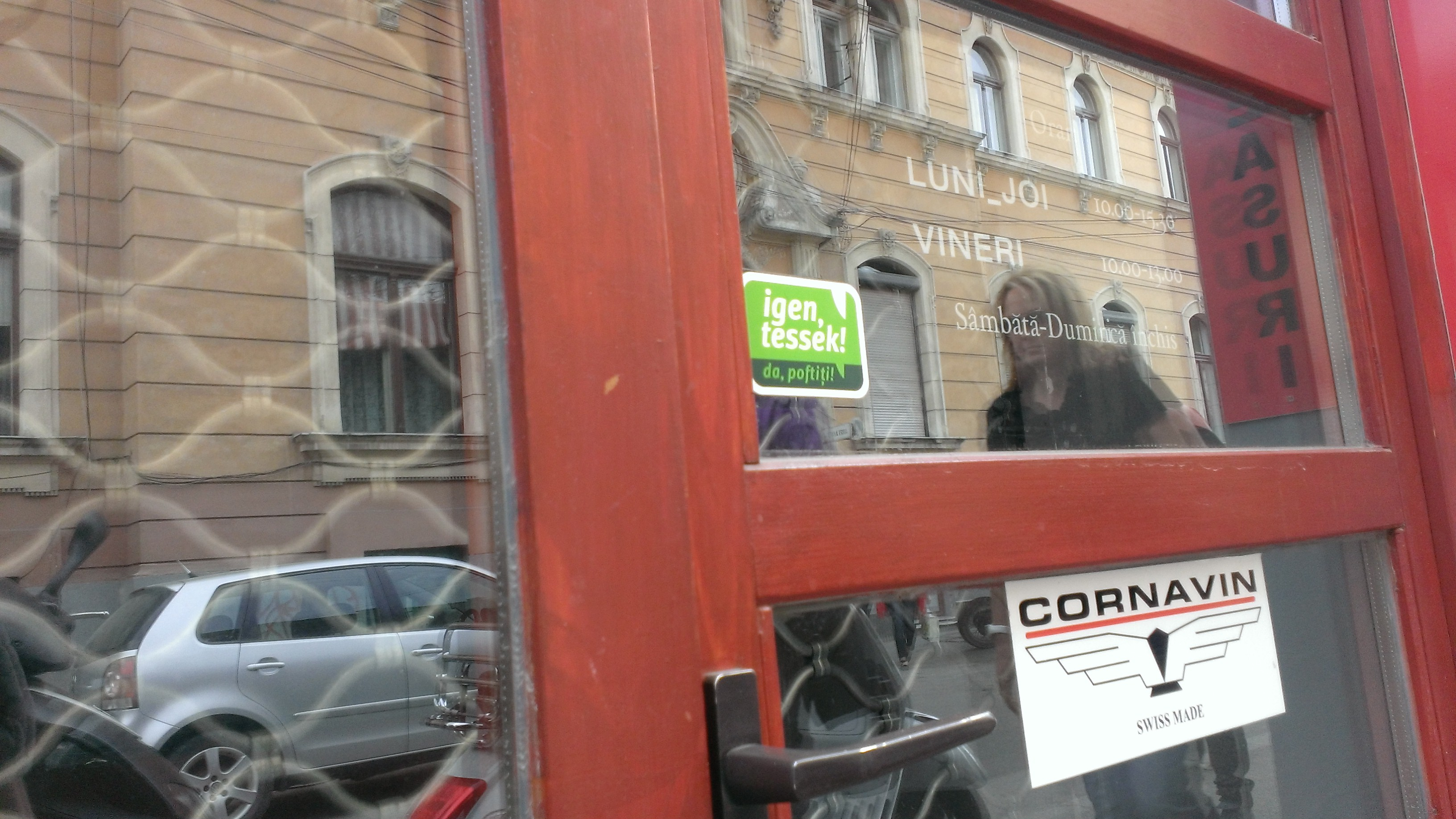 autocolantedapoftiti